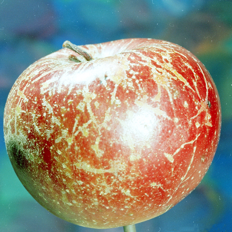 Podosphaera leucotricha (Ellis & Everh.) E.S. Salmon, symptômes sur fruit (Malus domestica).